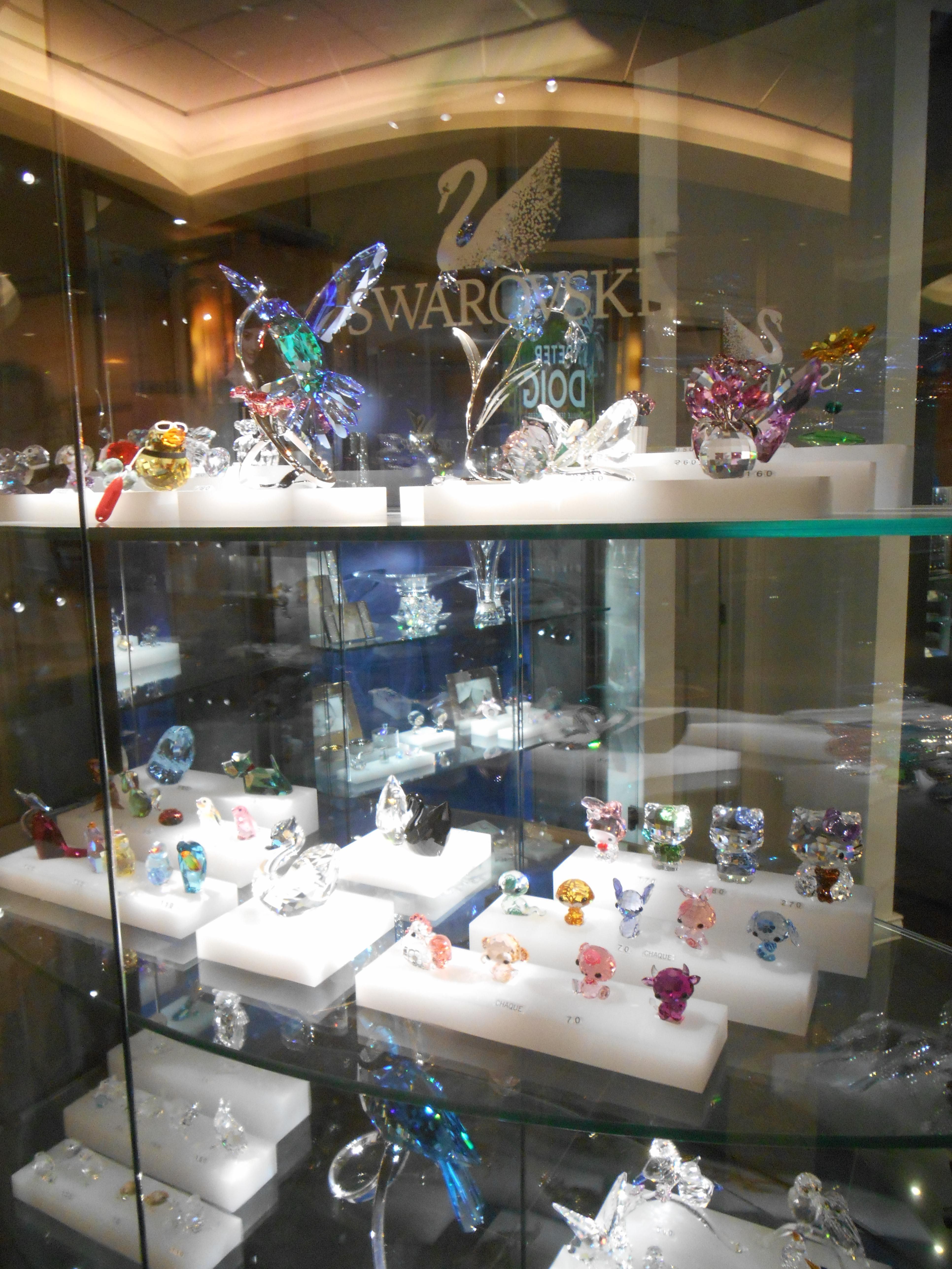 Produits Swarovski exposés dans une vitrine d'une bijouterie à la gare centrale de Montréal